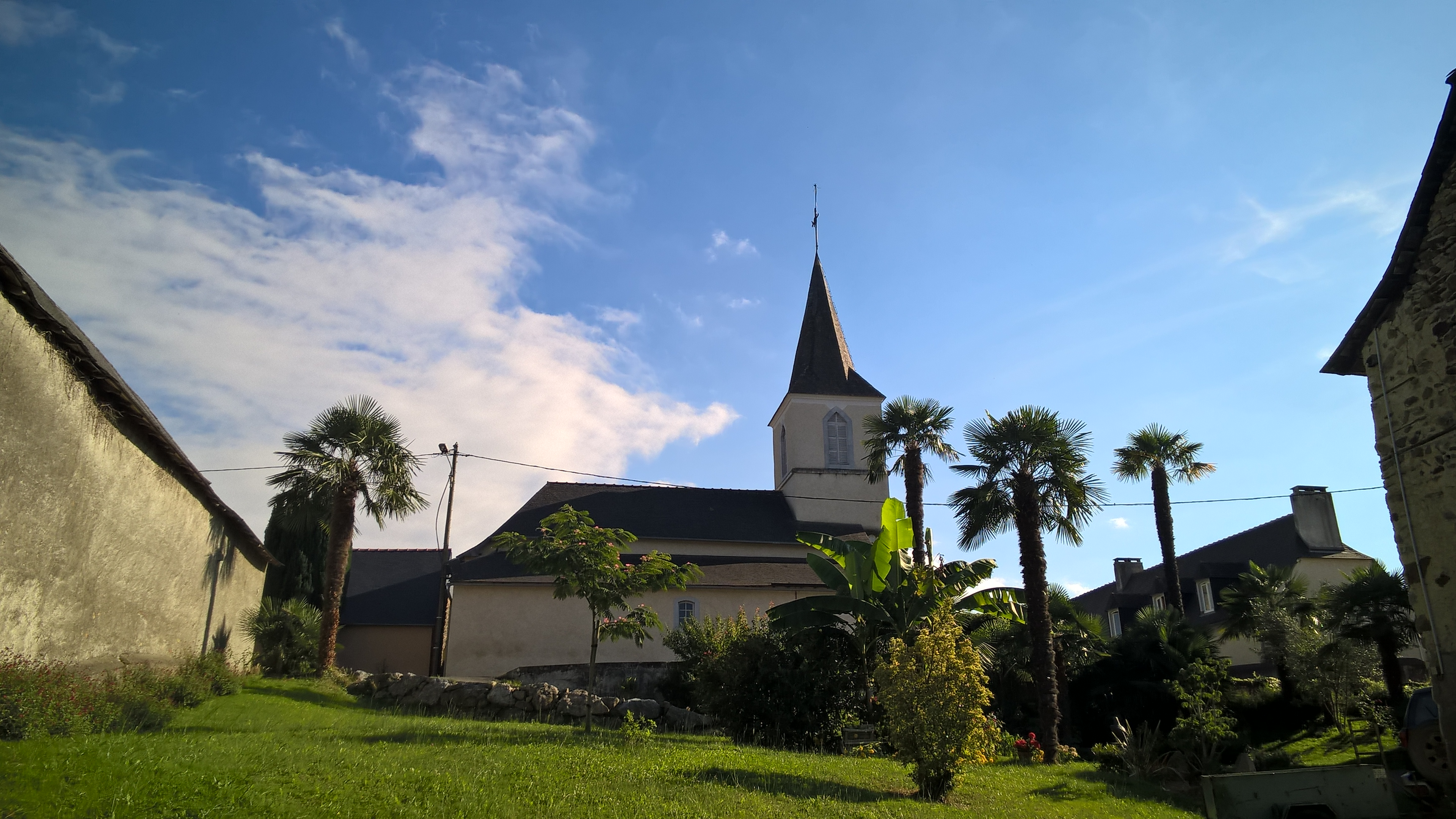 Eglise Saint-Laurent, Layrisse